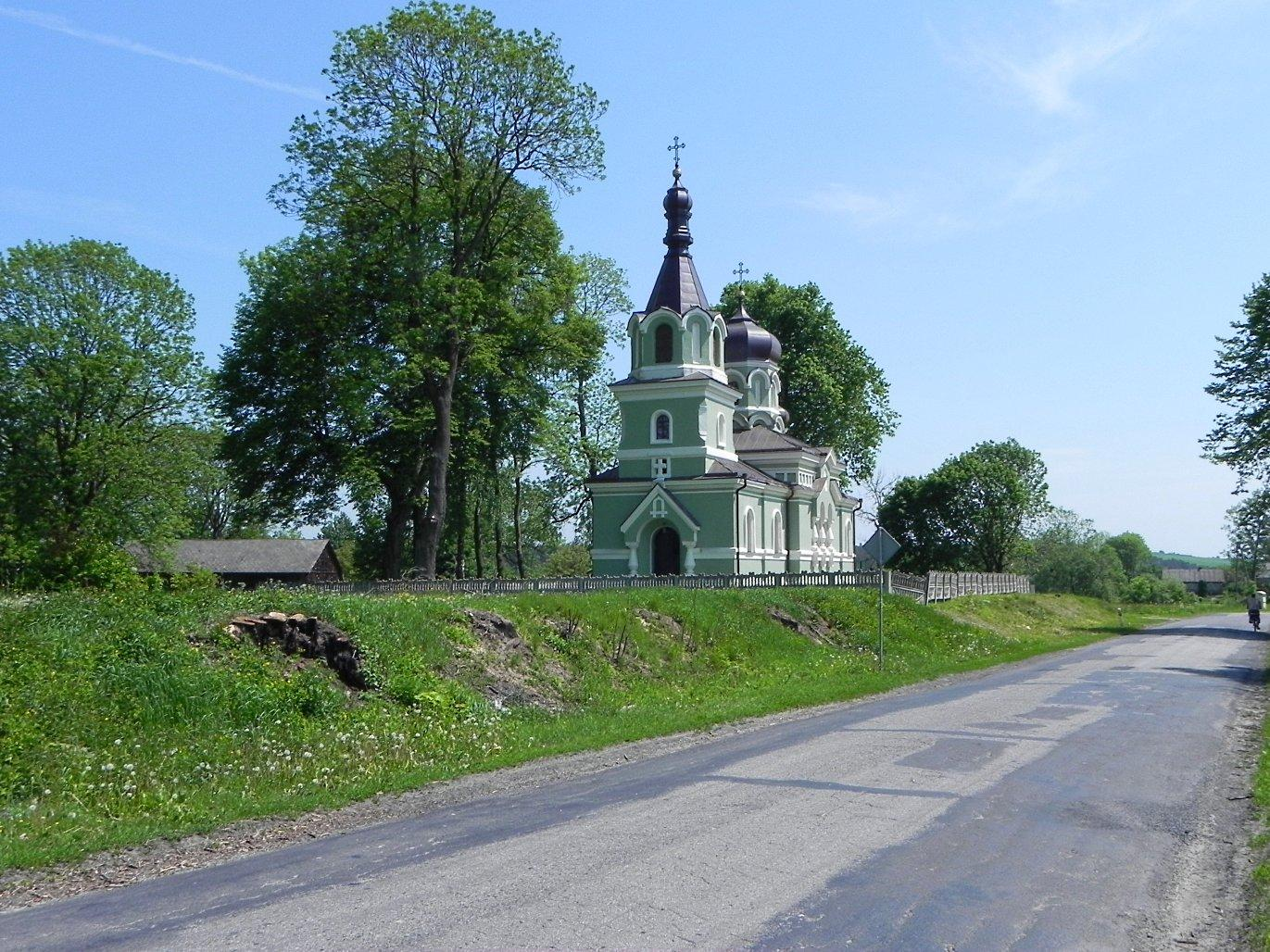 Cerkiew Opieki Matki Bożej w Bończy po renowacji. Lipy od strony drogi to już historia. Zarząd Dróg dokonał wycinki pod poszerzenie kolejnego odcinka jezdni od Kraśniczyna do Bończy i dalej do Wojsławic.